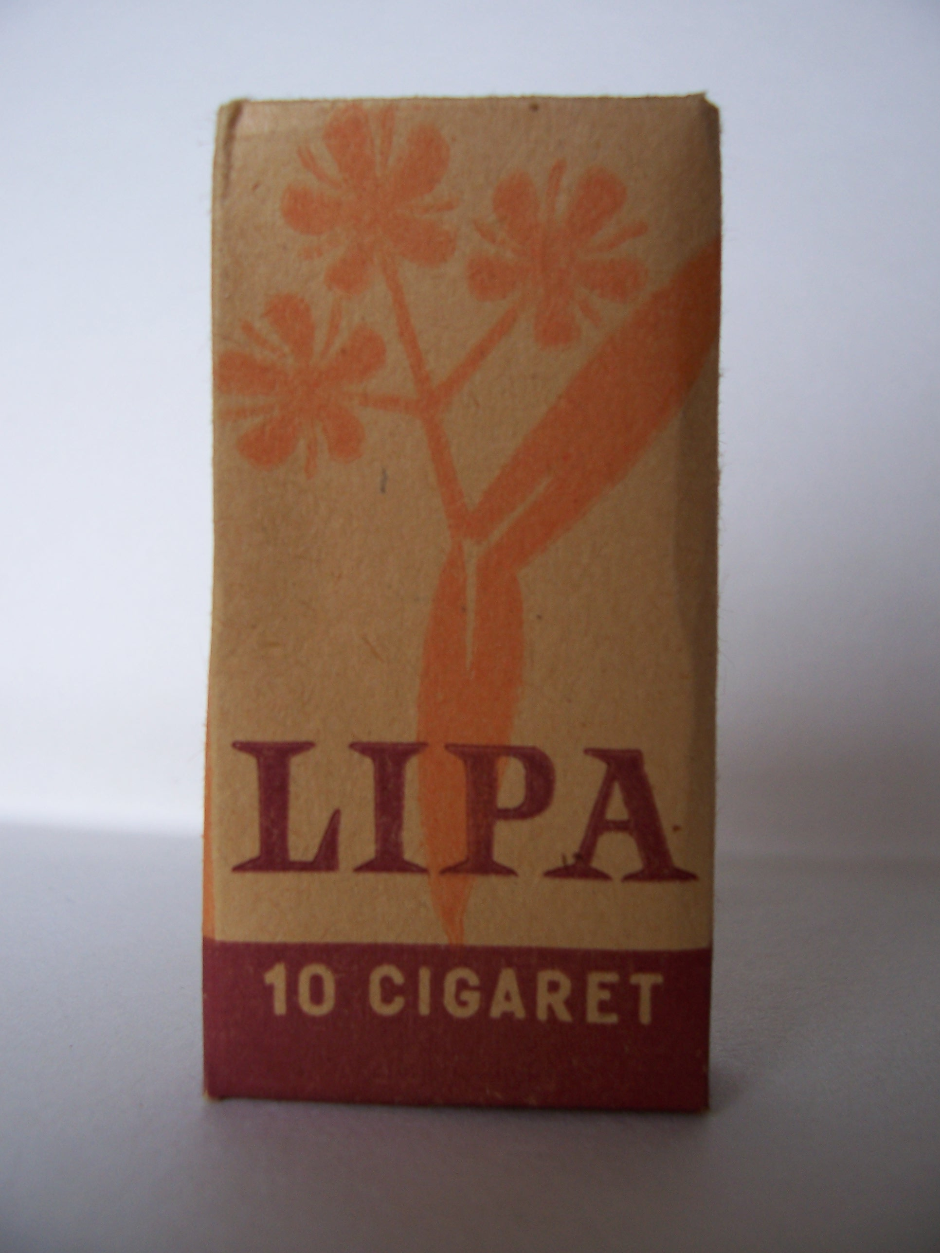 Cigarety Lípa, výrobce ČSTP, n. p. Kutná Hora; 60. léta